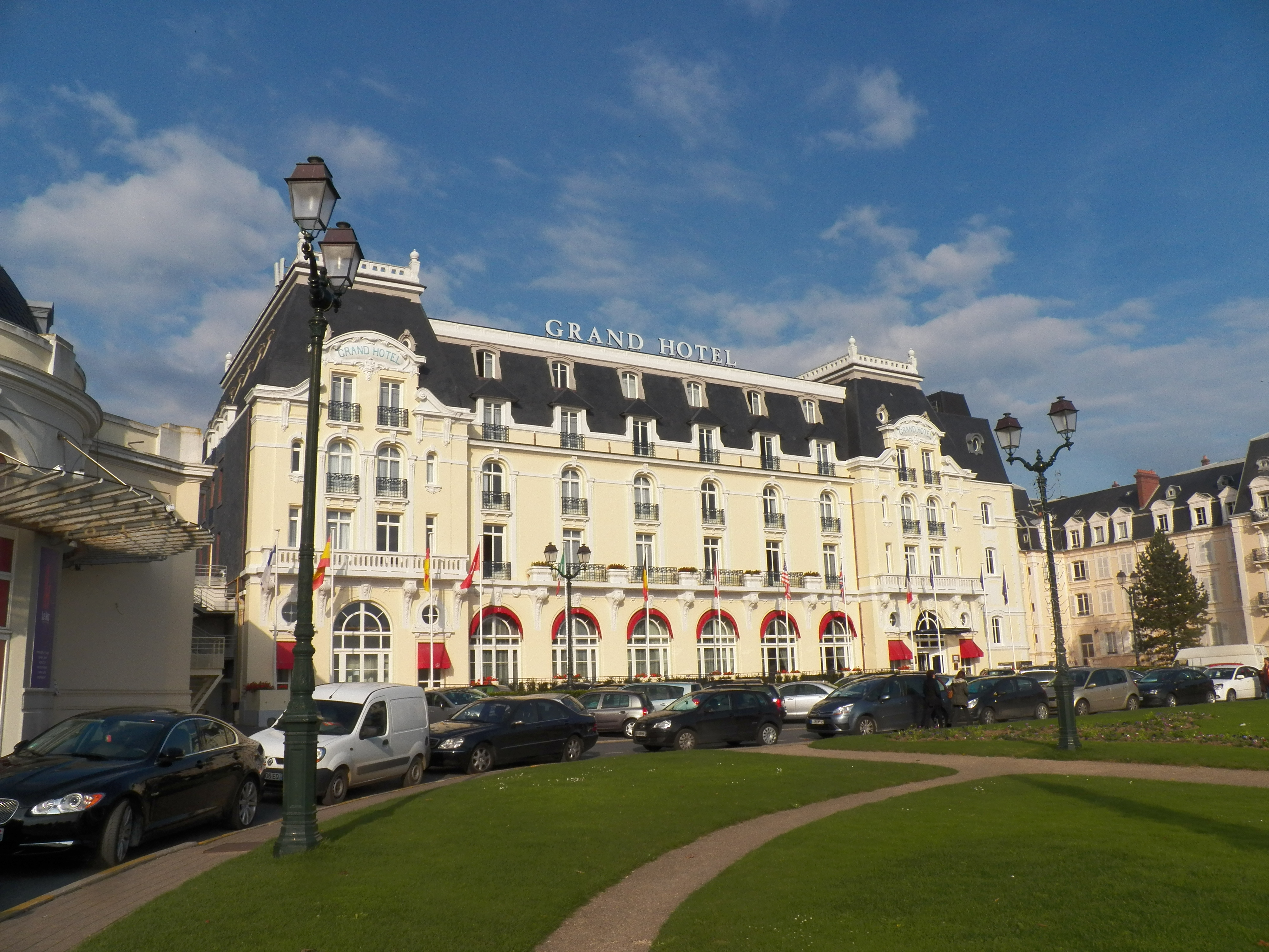 façade du Grand hôtel à Cabourg (Calvados)